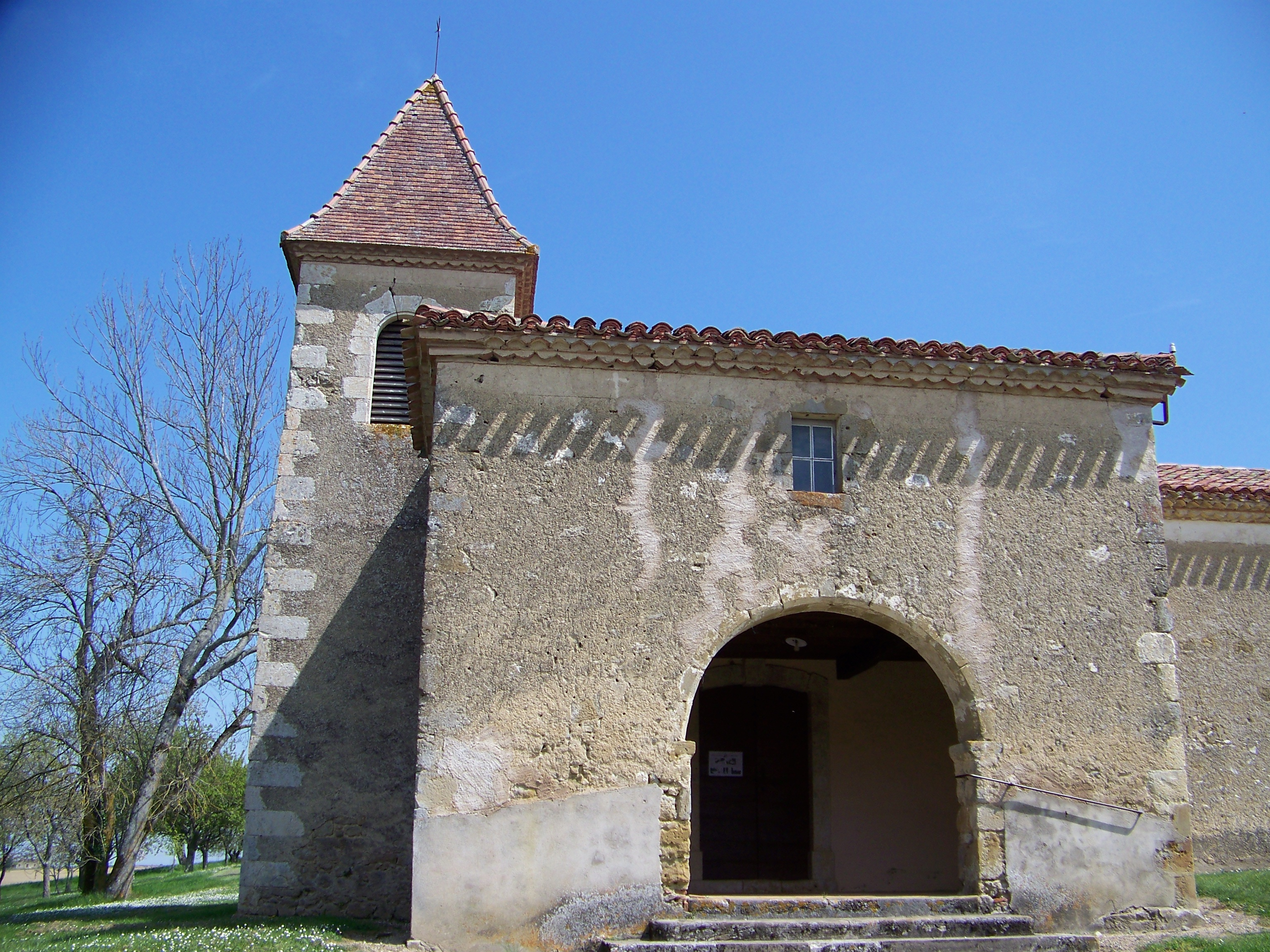 Église du village du Malartic, à Montaut-les-Créneaux (Gers)